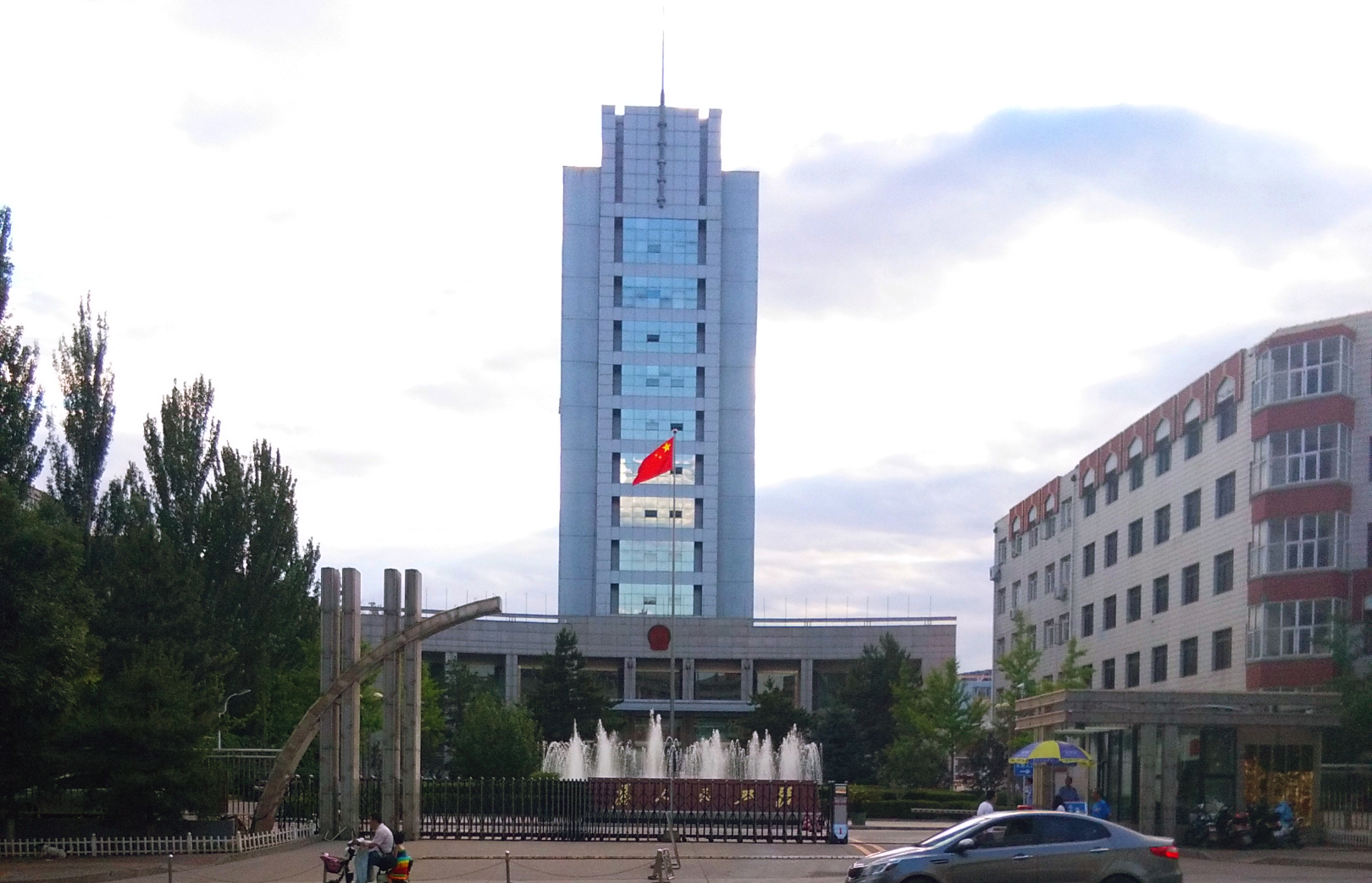 张家口市桥东区人民政府。